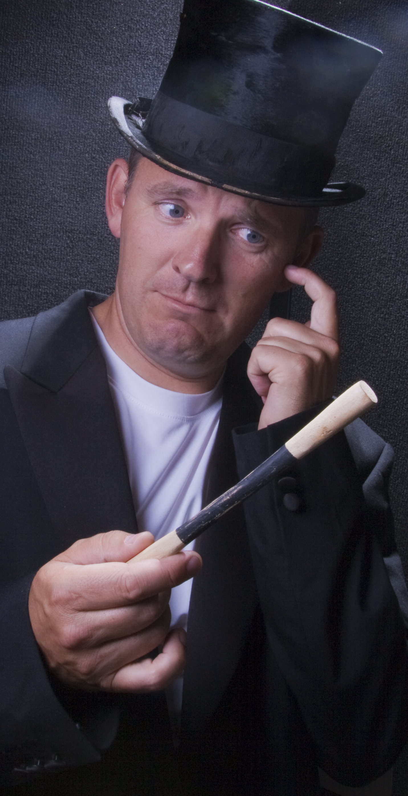 Hilbert als 'de Grote Macaroni' in 'het Allergeheimste Goochelgeheim'